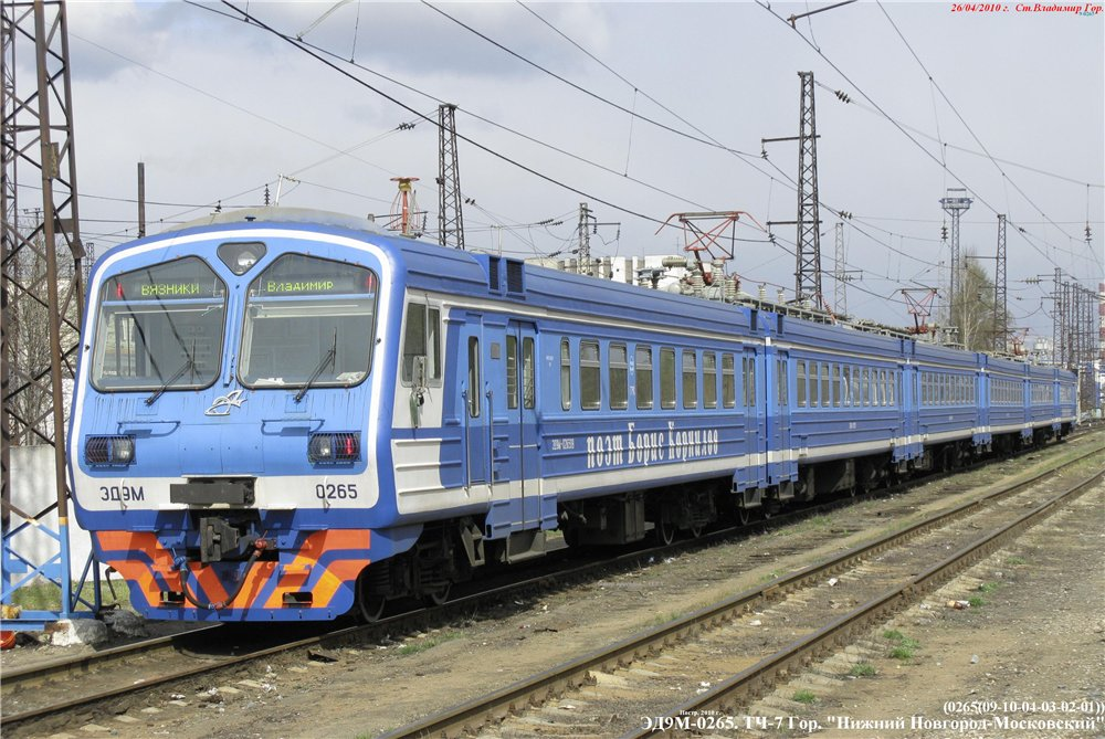 Электропоезд ЭД9М-0265, названный именем поэта Бориса Корнилова